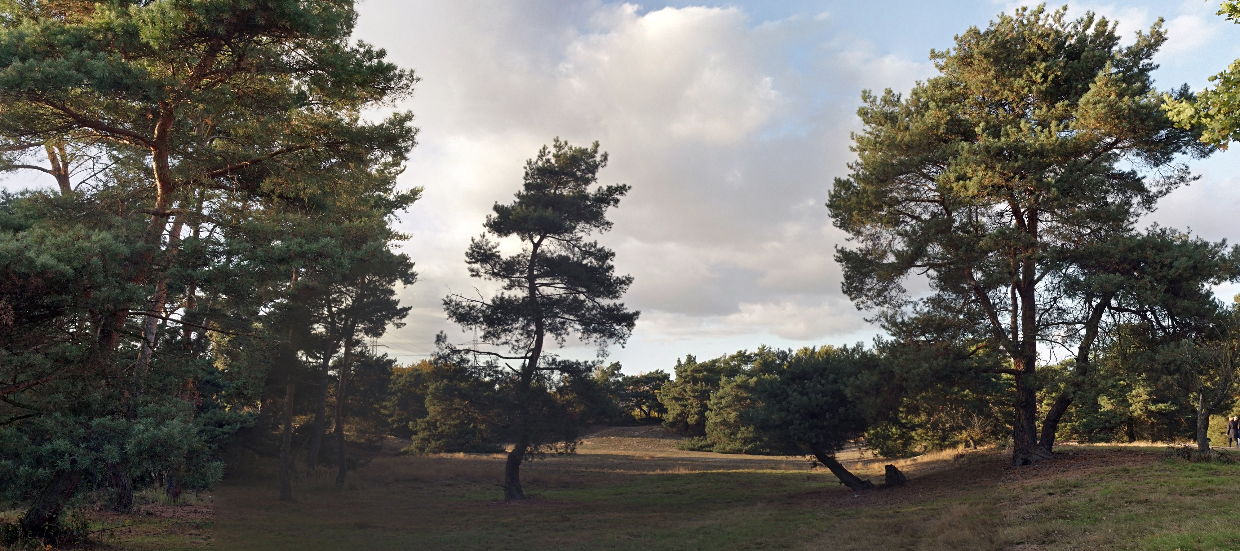 Schwanheimer Düne